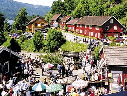 Pinsetreffet på Eidsfoss